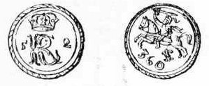 Ilustracja do Encyklopedii staropolskiej T.2 240 - halerz litewski Jana Kazimierza z r. 1652